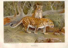 Párducok Brehm az Állatok világa c. művéből. Vastagh Géza munkája.